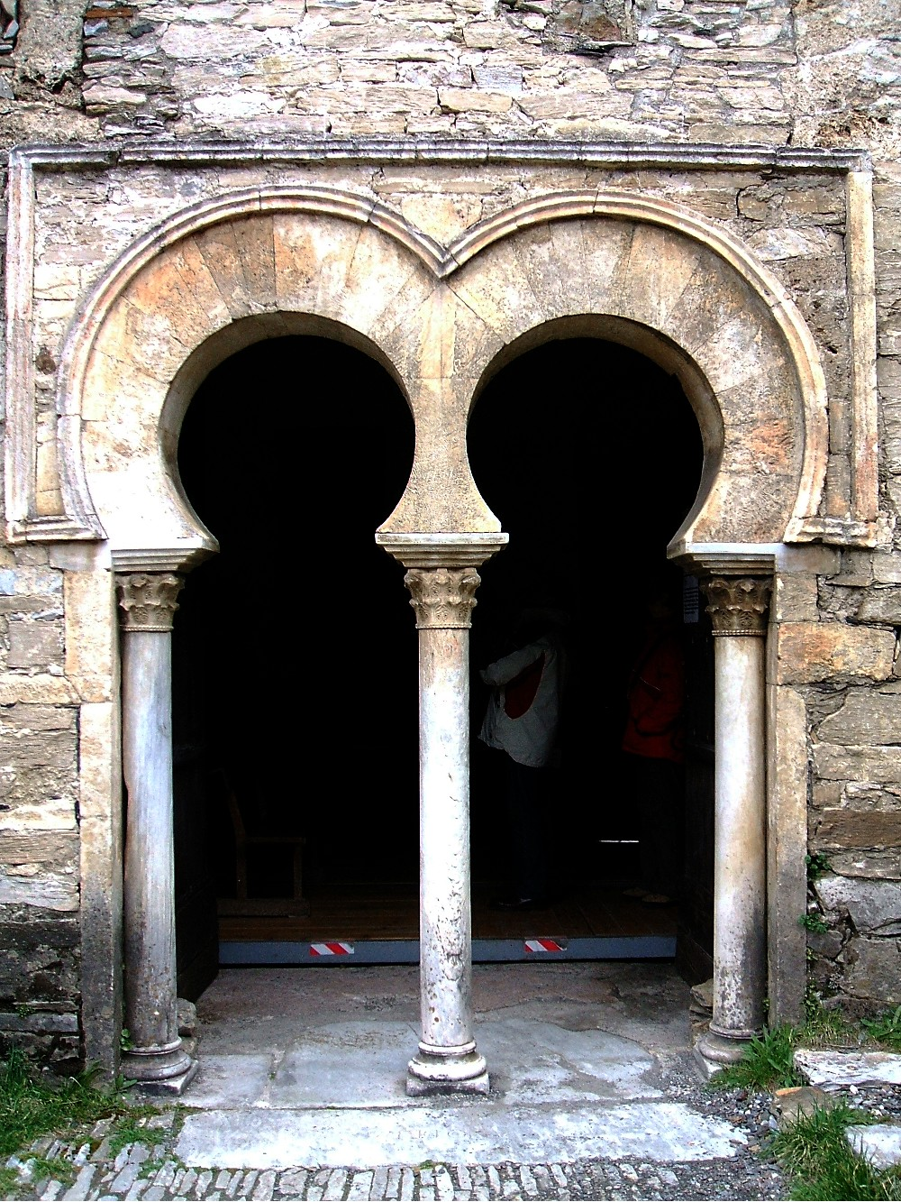 Iglesia mozárabe de Santiago de Peñalba, en Peñalba de Santiago